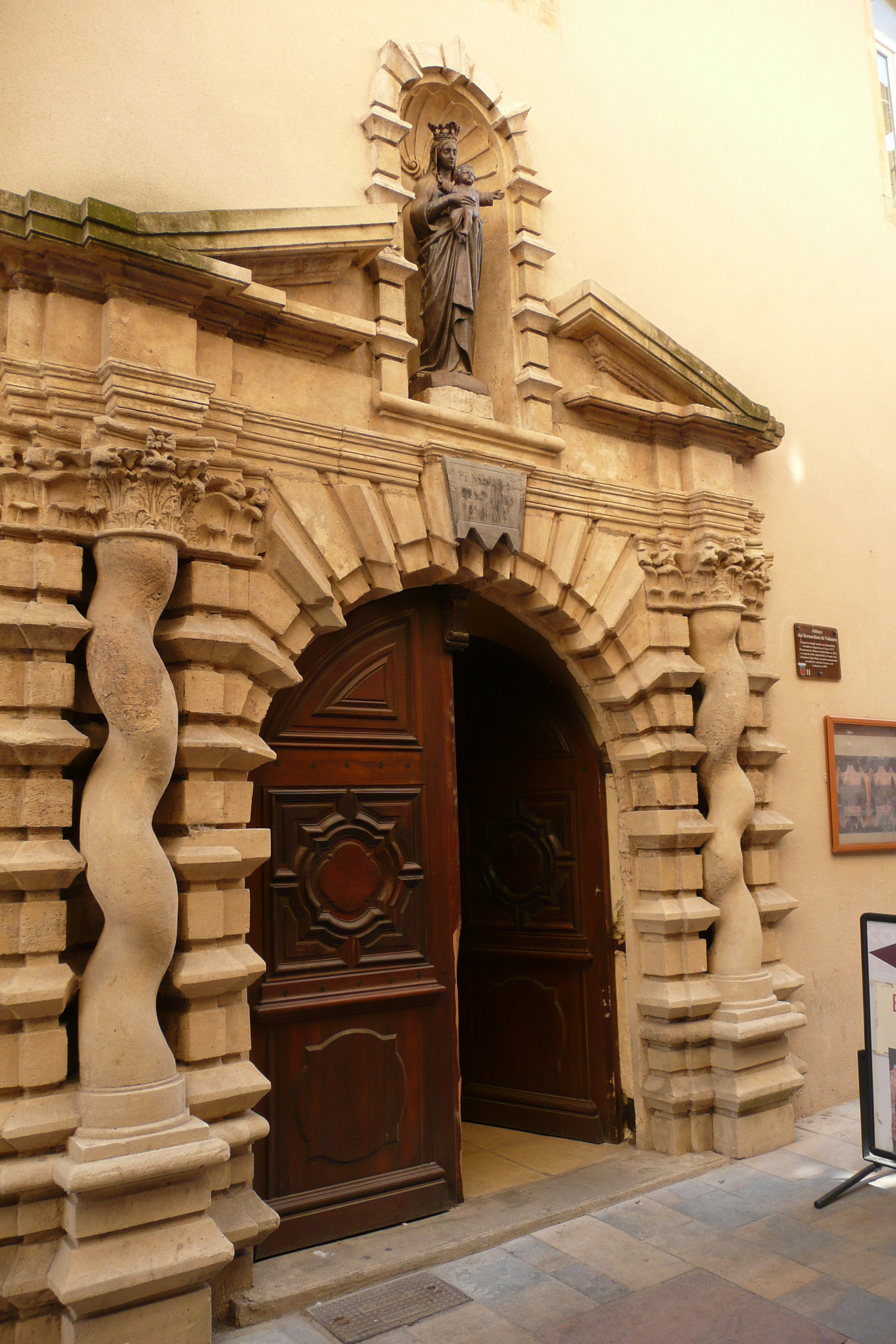 Abbaye des Bernardines de Valsauve, porte restaurée en 1999 à Bagnols-sur-Cèze.